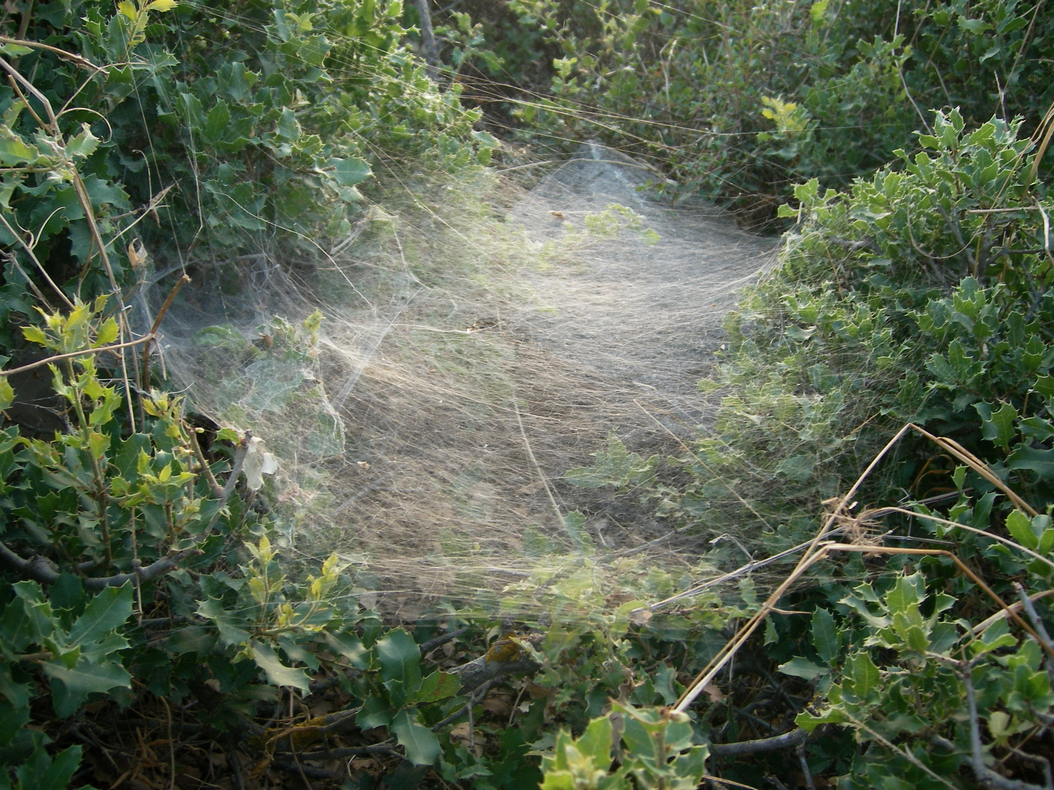 Yayladağı'ndan çeşitli görüntüler